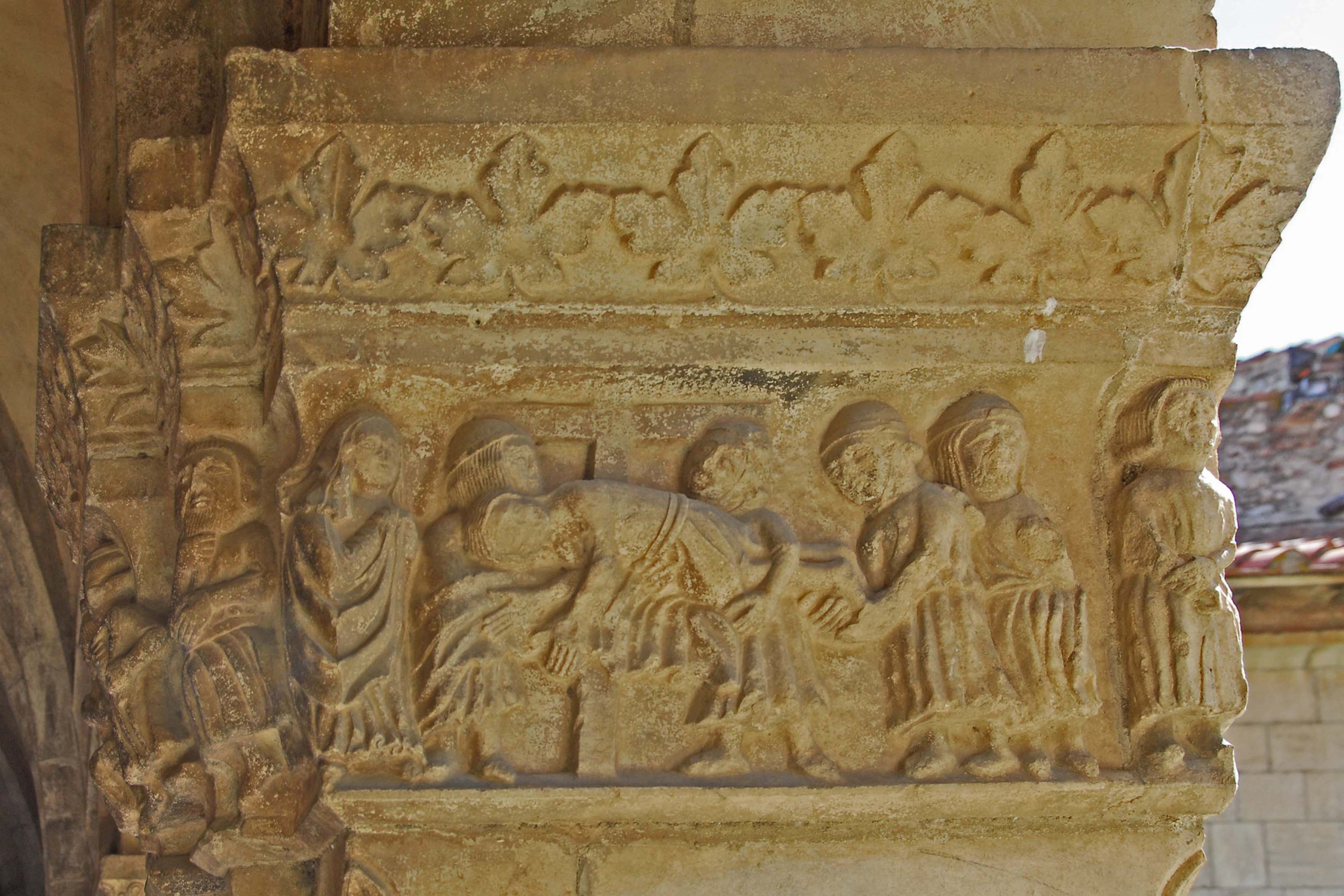 Ste-Eulalie-et-Ste-Julie_d’Elne, Pfeilerkapitell Ostgalerie, Kreuzabnahme